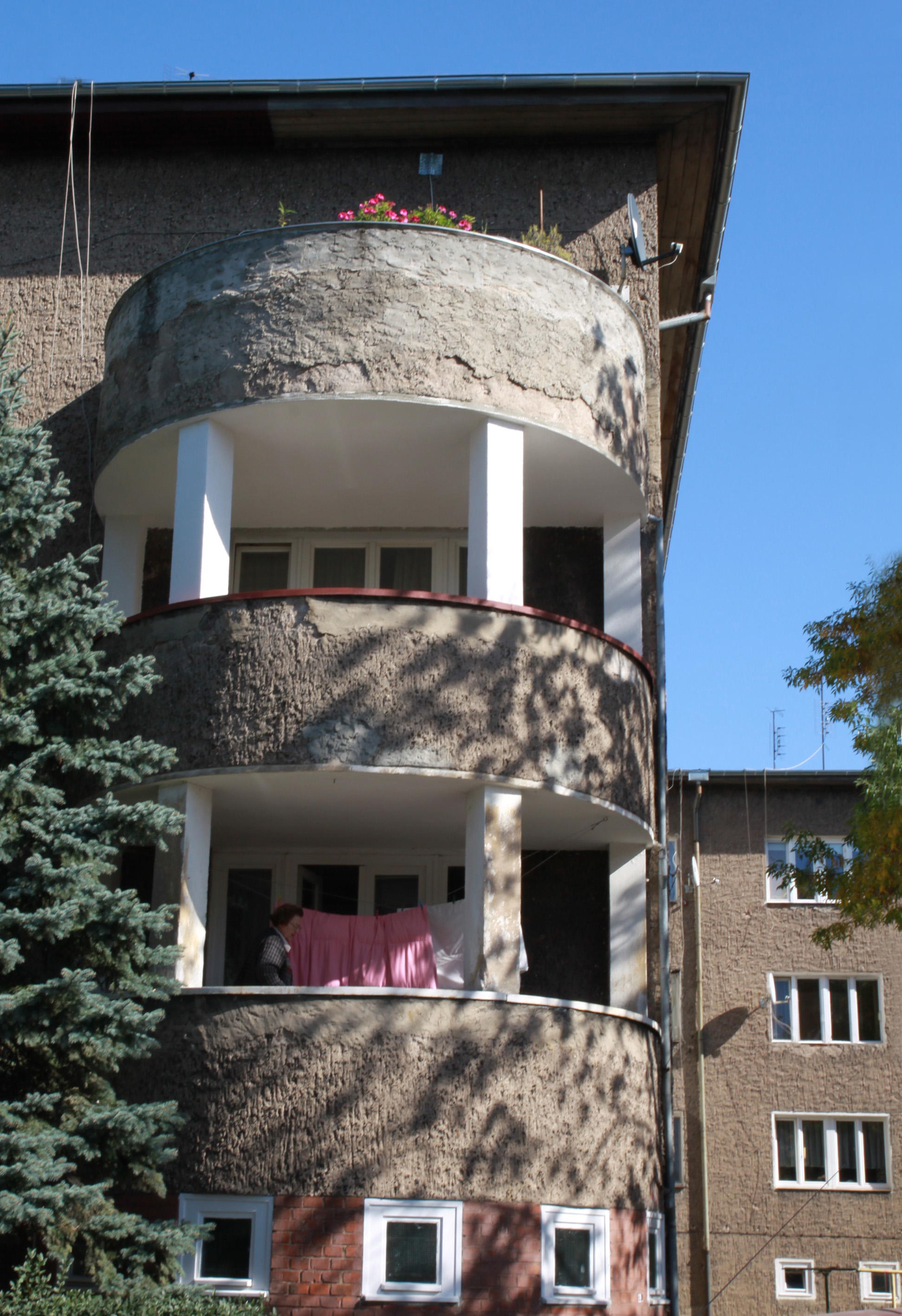 Osiedle Księże Małe - zespół urbanistyczny. W granicach ulic: Katowicka, Bytomska, Chorzowska, Gliwicka, Górnośląska, Tarnogórska , Opolska